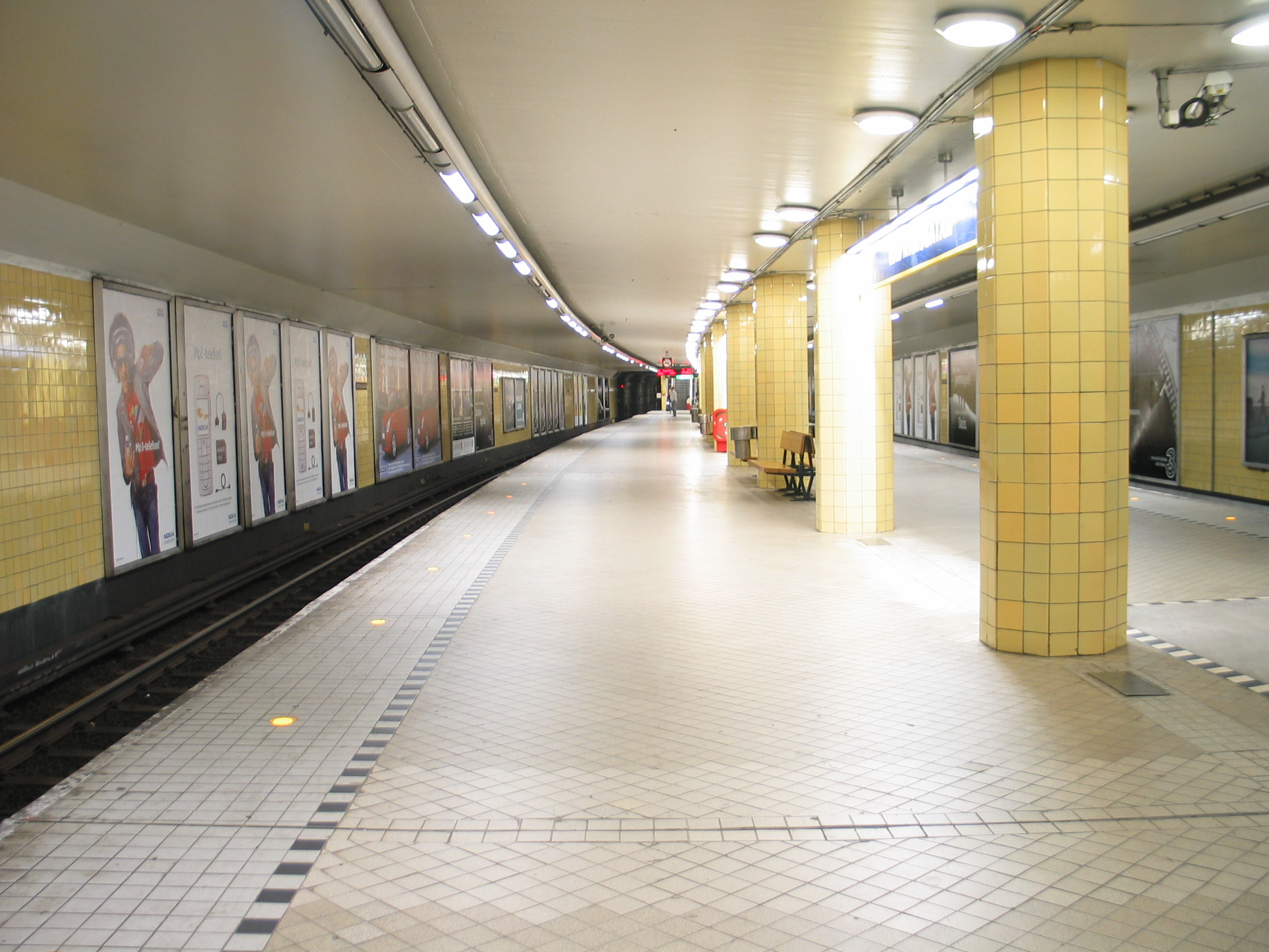 Rådmansgatan, a metro station in Stockholm, Sweden.